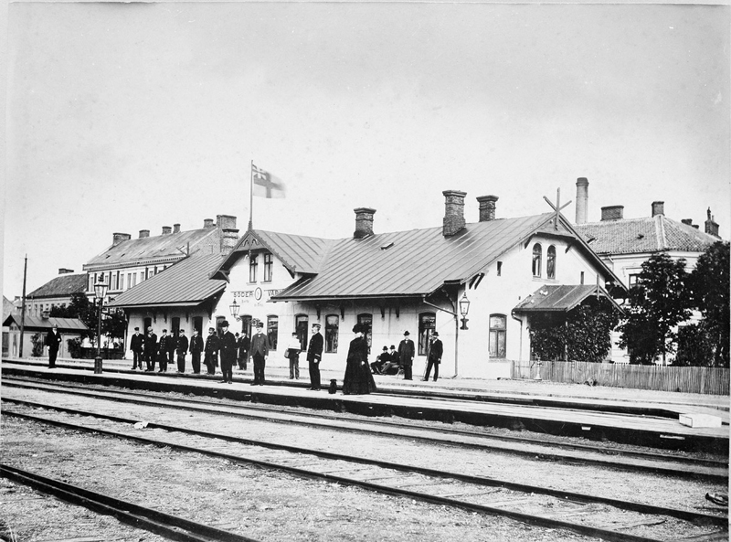 Södervärn Railway Station, Malmö, Sweden.